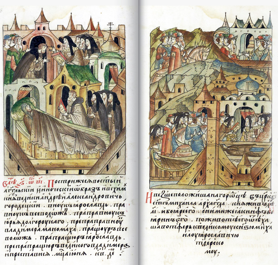 ЛИЦЕВОЙ ЛЕТОПИСНЫЙ СВОД В 6812 году. Постригся в святой ангельский и иноческий образ и в схиму князь великий Андрей Александрович Городецкий, внук Ярославов, правнук Всеволодов, праправнук Юрия Долгорукого, препраправнук Владимира Манамаха, (потомок) пращура Всеволода, прапращура Ярослава, препрапращура великого Владимира, и преставился месяца июня в 22-й день. И повезли, и положили на Городце, в церкви святого Михаила архангела. Княжил 11 лет. И бояре его, с ними же и Акинф, боярин его, после смерти его отъехали в Тверь к великому князю Михаилу Ярославичу Тверскому.